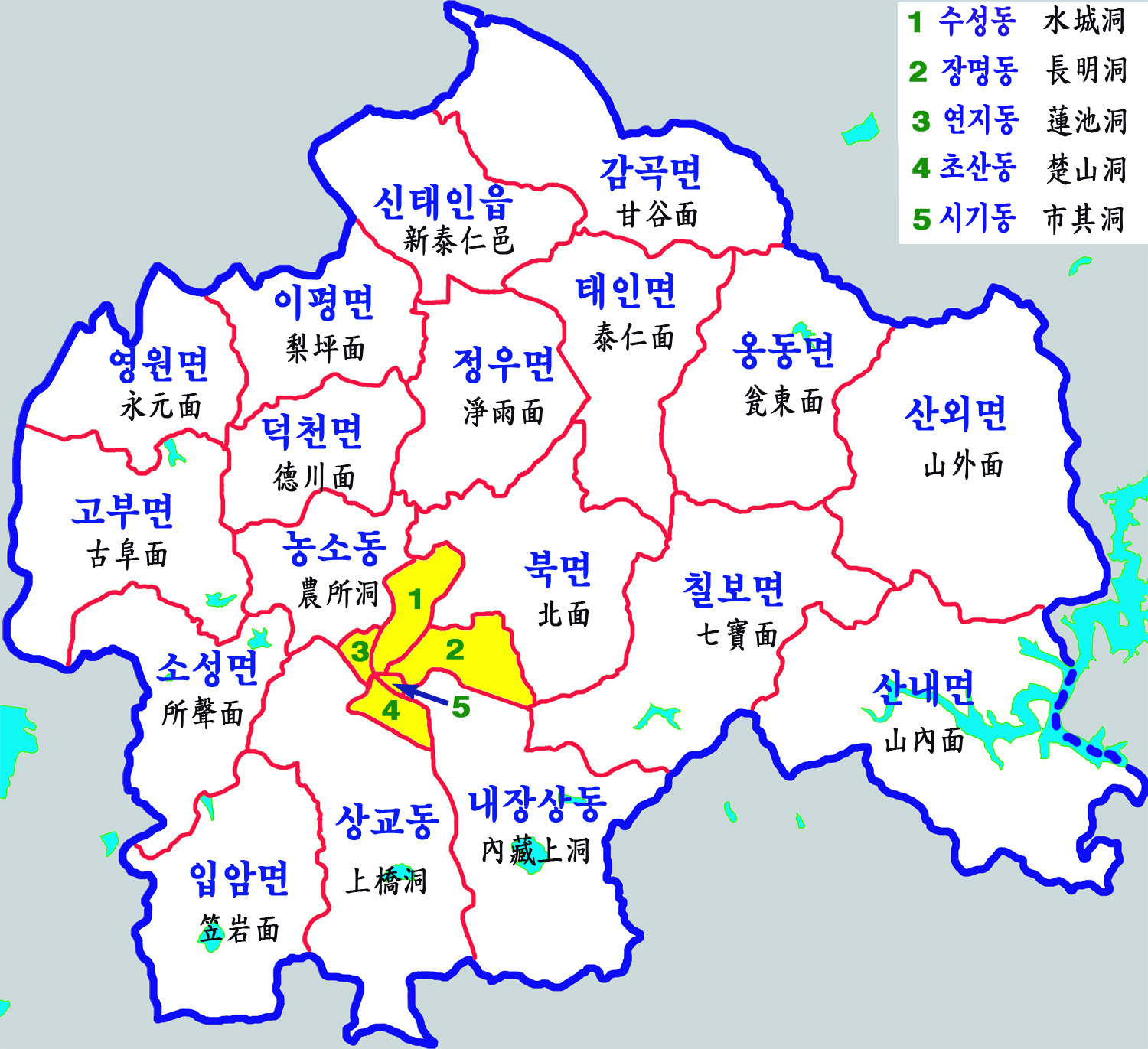 전북 정읍시 행정구역도